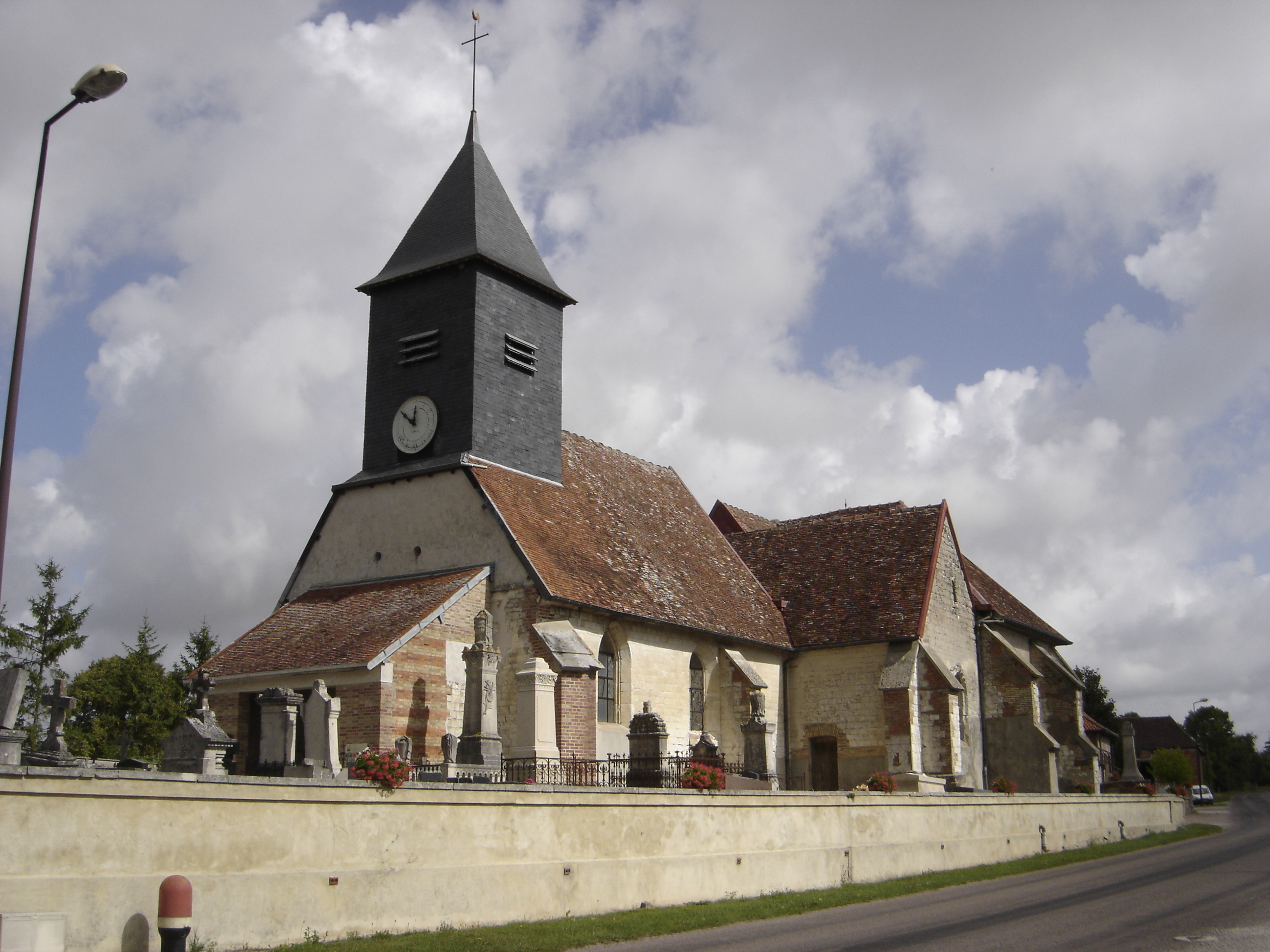 église Notre-Dame de l'Assomption - Laubressel - Aube - France